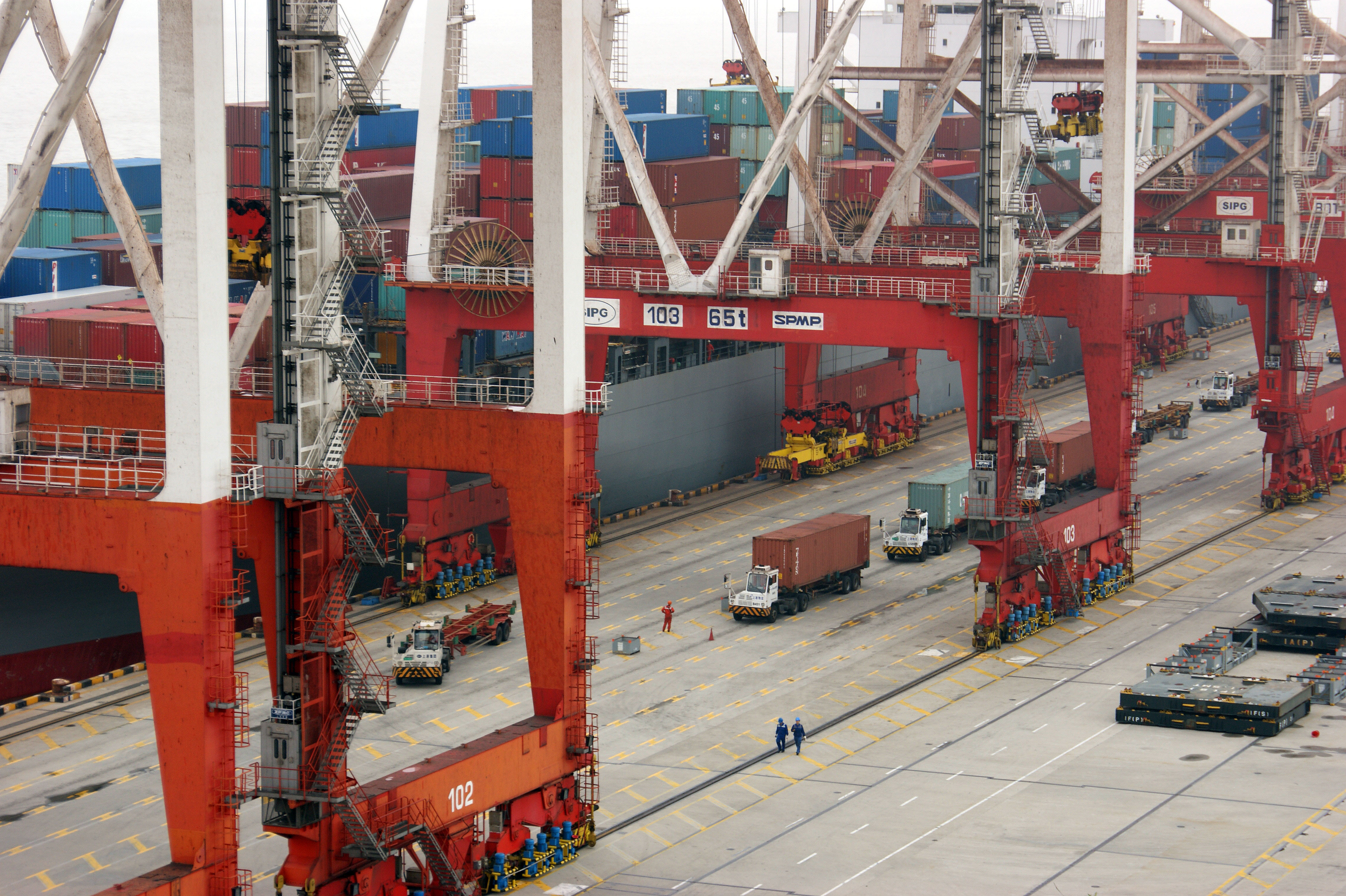 Détail portiques containers et chargement d'un navire sur le port en eau profonde de Yangshan